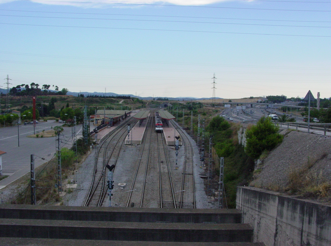 Estació de Renfe Bellaterra